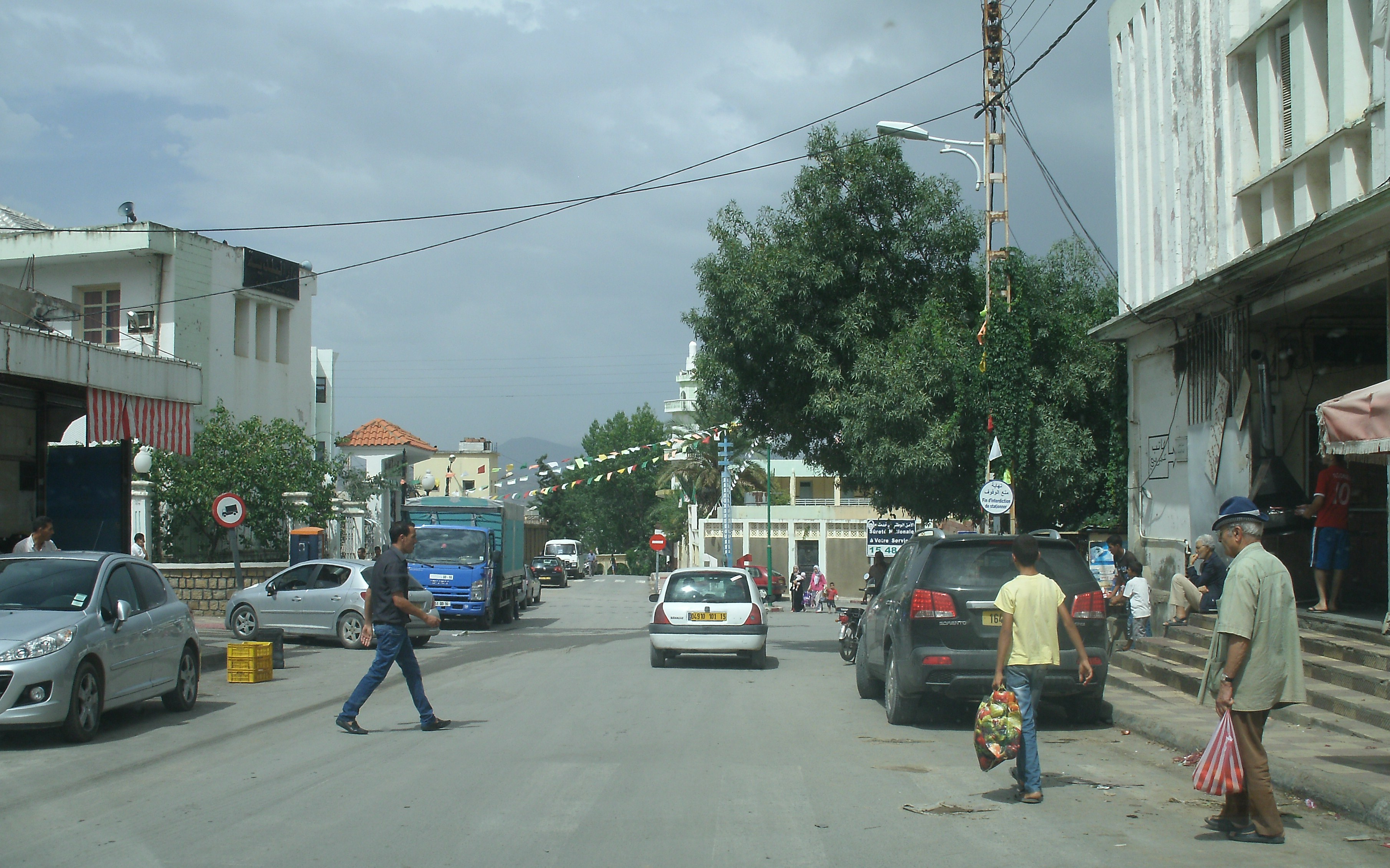 La route nationale traversant Djimla, agglomération de la wilaya de Jijel